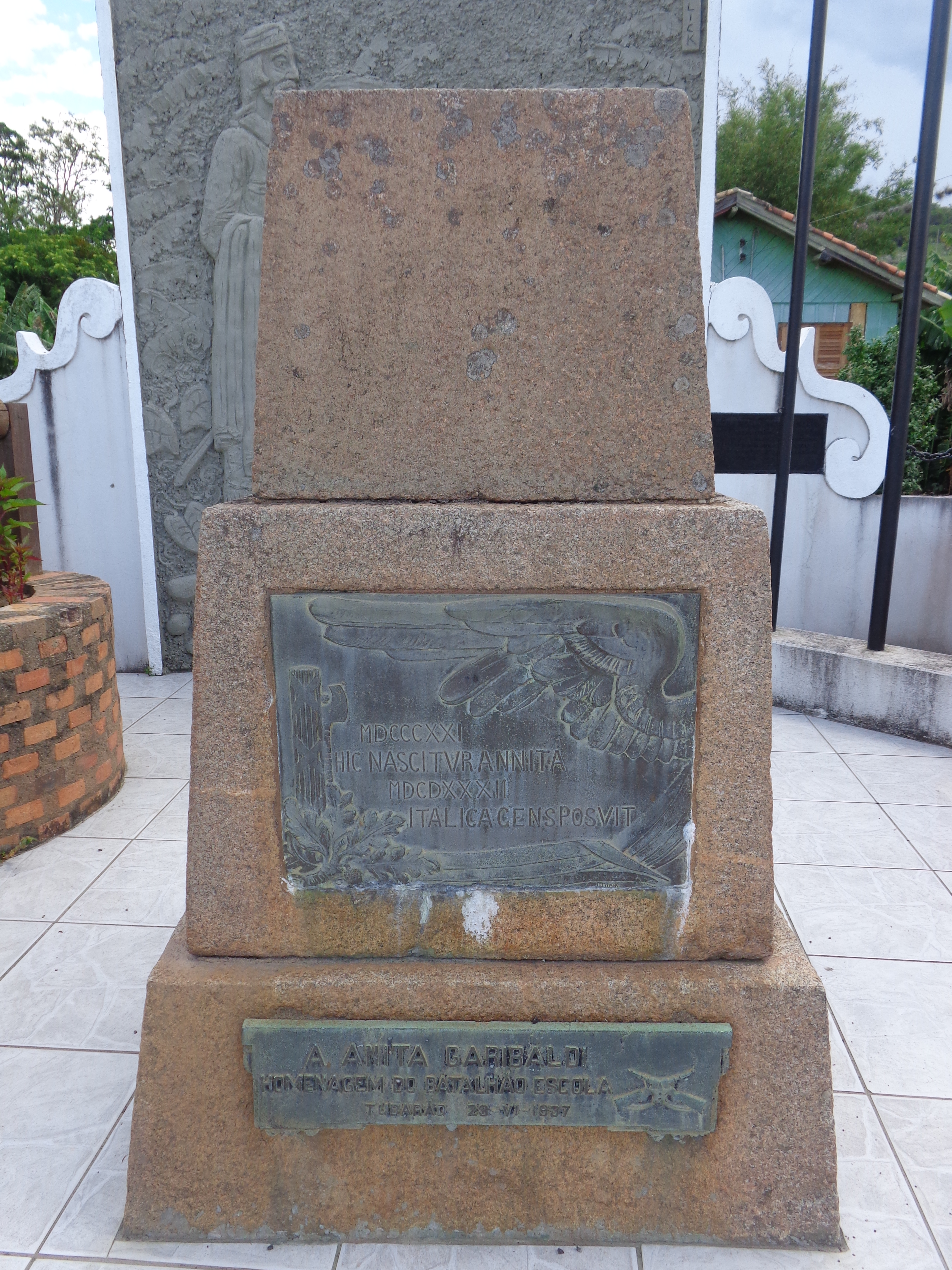 Monumento a Anita Garibaldi no local de seu nascimento em Morrinhos, Tubarão, Santa Catarina.